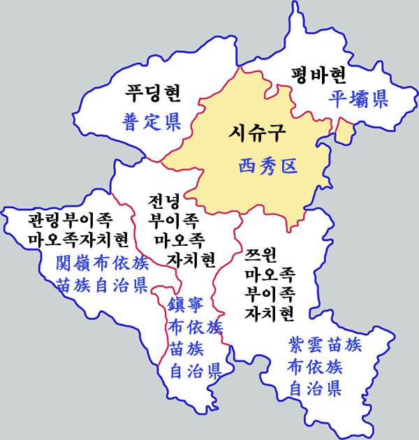 안순시 현급구역도